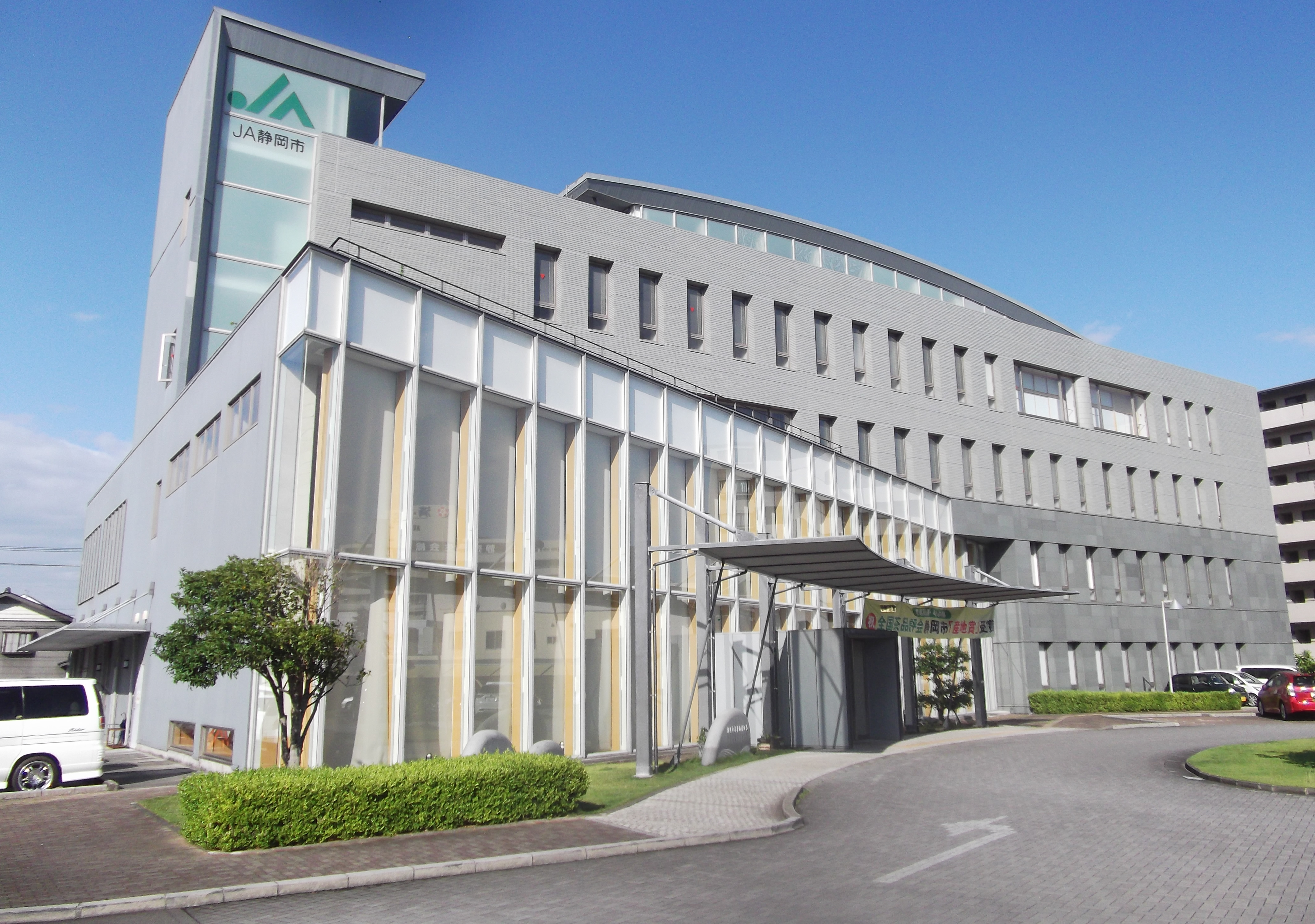 静岡市農業協同組合（JA静岡市)本店